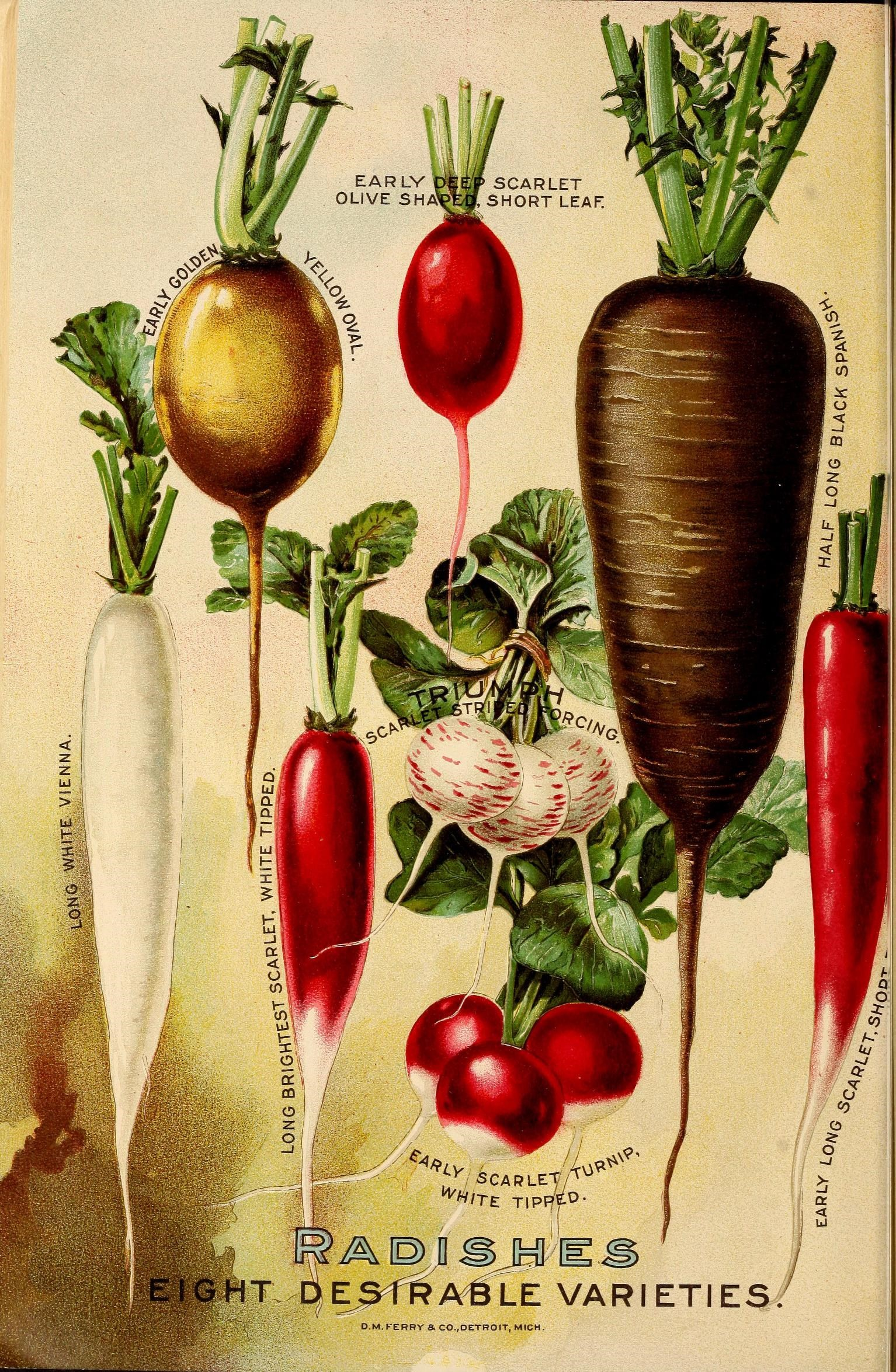 HT AeM^ LE VARIETIES D.M. KERRY S. CO.,DETROIT, MICH.